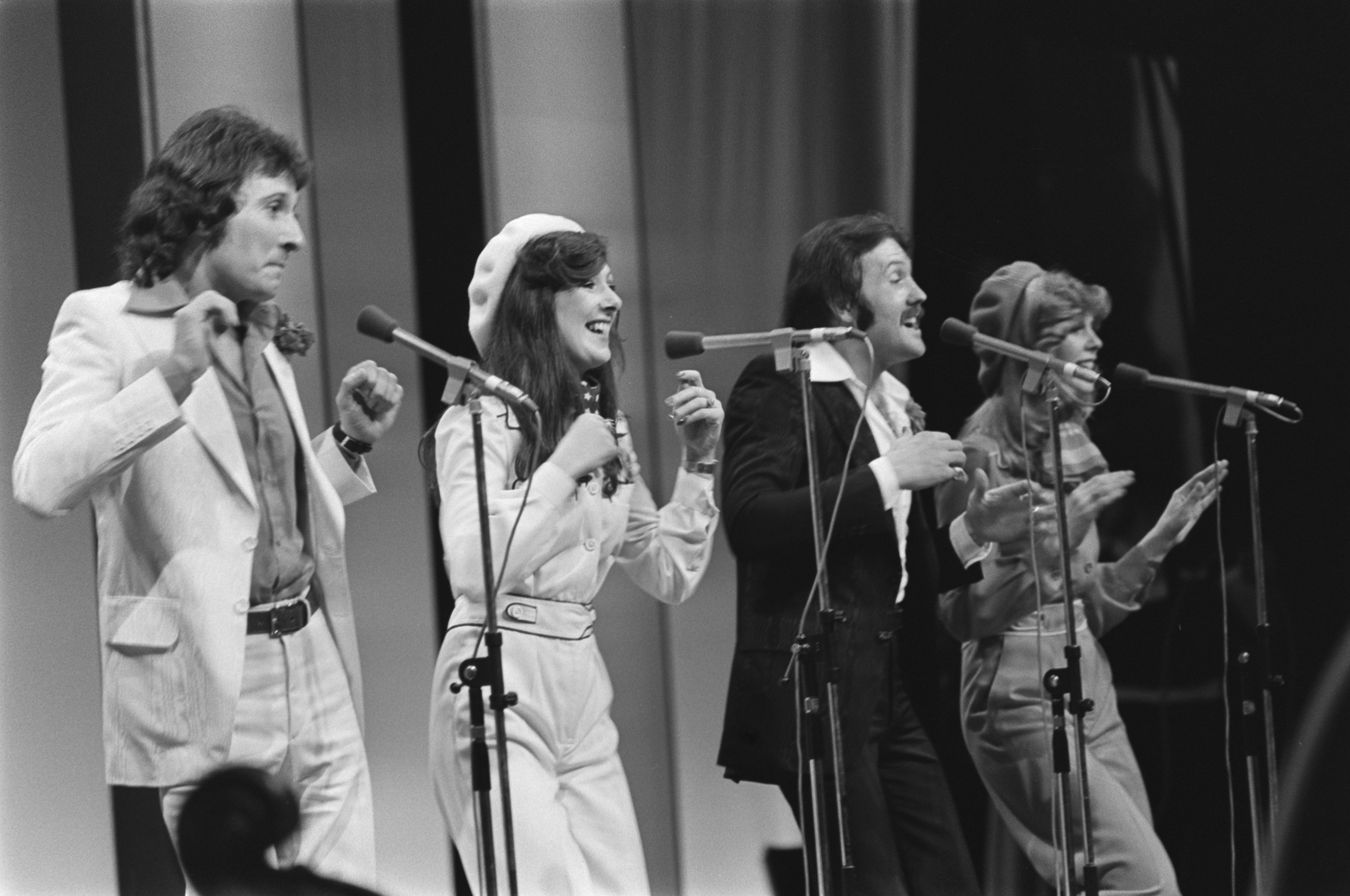 Collectie / Archief : Fotocollectie Anefo Reportage / Serie : [ onbekend ] Beschrijving : Eurovisie Songfestival 76 Den Haag ; Brotherhood of Man (Engeland) tijdens optreden Datum : 3 april 1976 Locatie : Den Haag, Groot-Brittannië Trefwoorden : songfestivals Persoonsnaam : Brotherhood of Man, Eurovisie Songfestival Fotograaf : Mieremet, Rob / Anefo Auteursrechthebbende : Nationaal Archief Materiaalsoort : Negatief (zwart/wit) Nummer archiefinventaris : bekijk toegang 2.24.01.05 Bestanddeelnummer : 928-5011